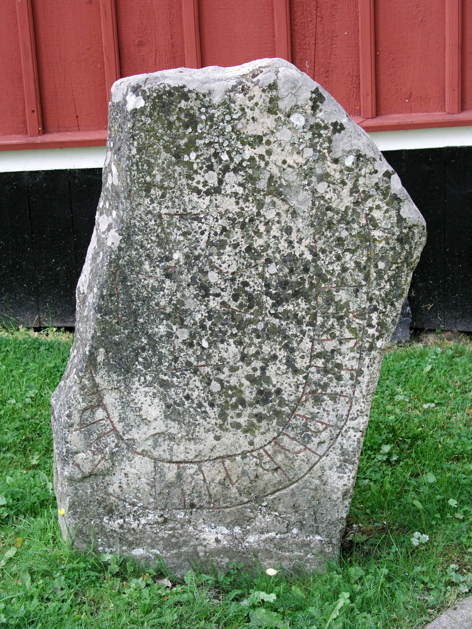 Hälsingtuna church, Runestone no 2, Hudiksvalls kommun.